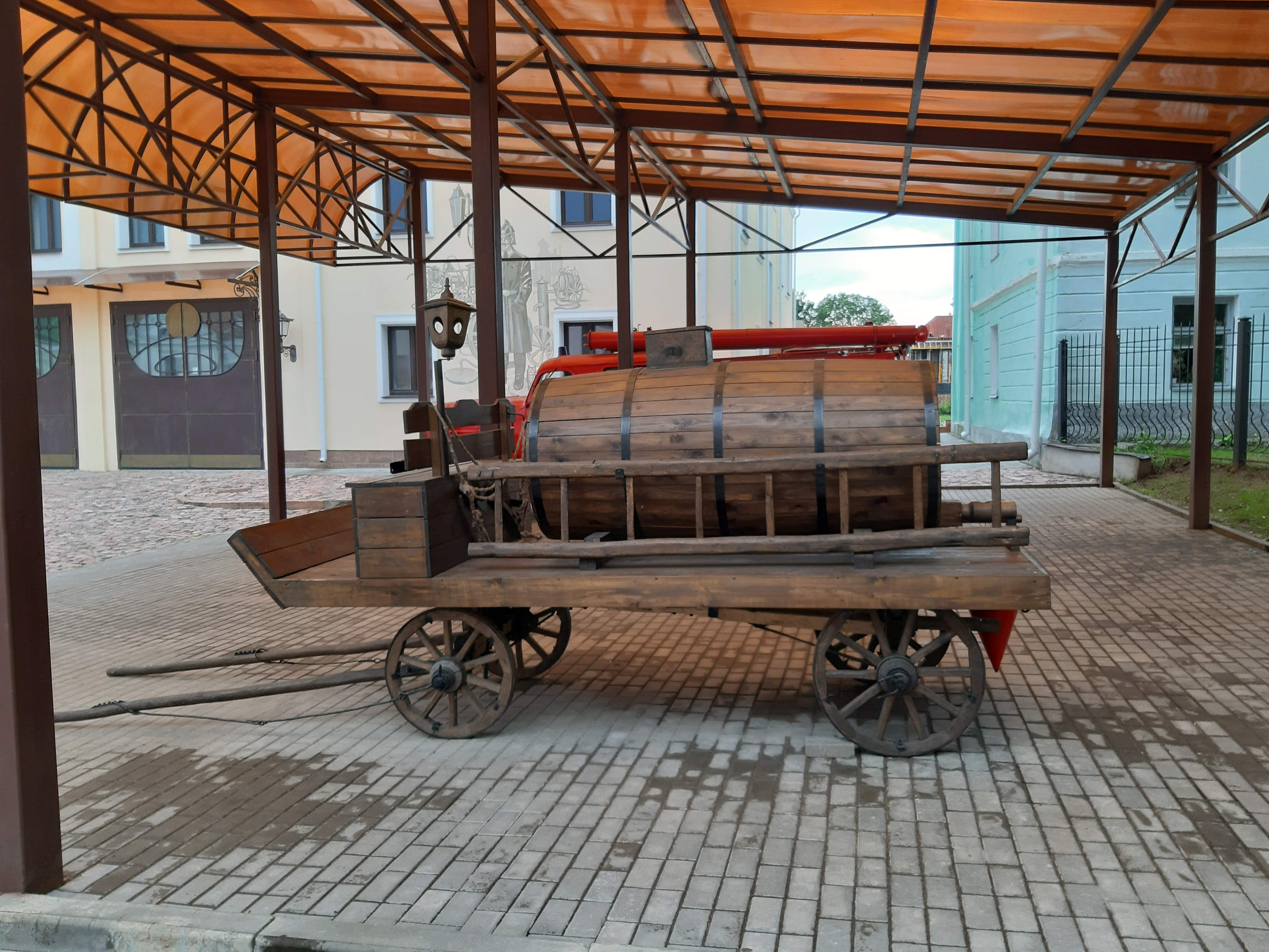 Магілёў. Двары Пажарнага завулка